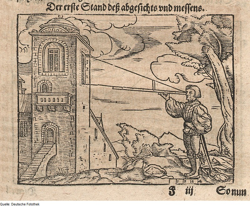 Original image description from the Deutsche Fotothek Geometrie & Vermessung & Messstab & Jakobstab